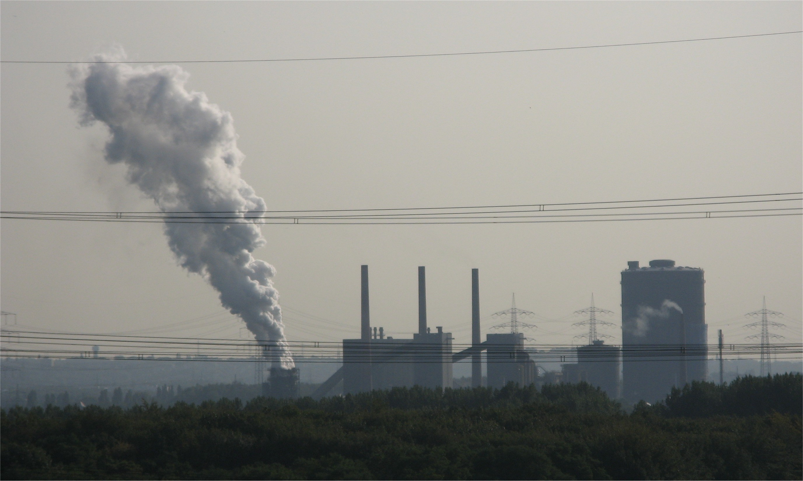 Kokerei Prosper und Zeche Prosper II in Bottrop (nicht Oberhausen!)